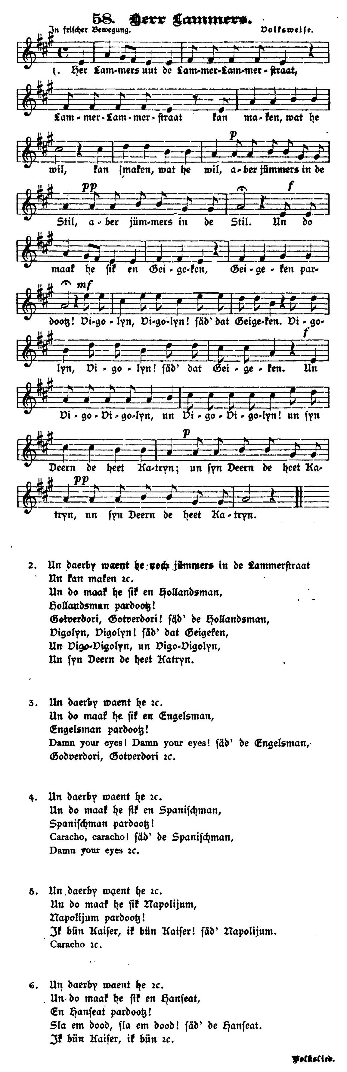 Her Lammers uut de Lammer-Lammerstraat, 1884er Fassung von Jan Hinnerk